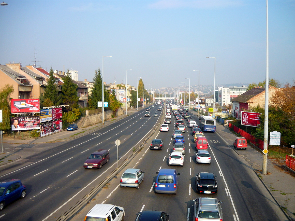 Budaörsi út at Sasad, Budapest, Hungary, near at the end of M1 and M7 motorways' joint session, where the motorway transforms into a busy city street